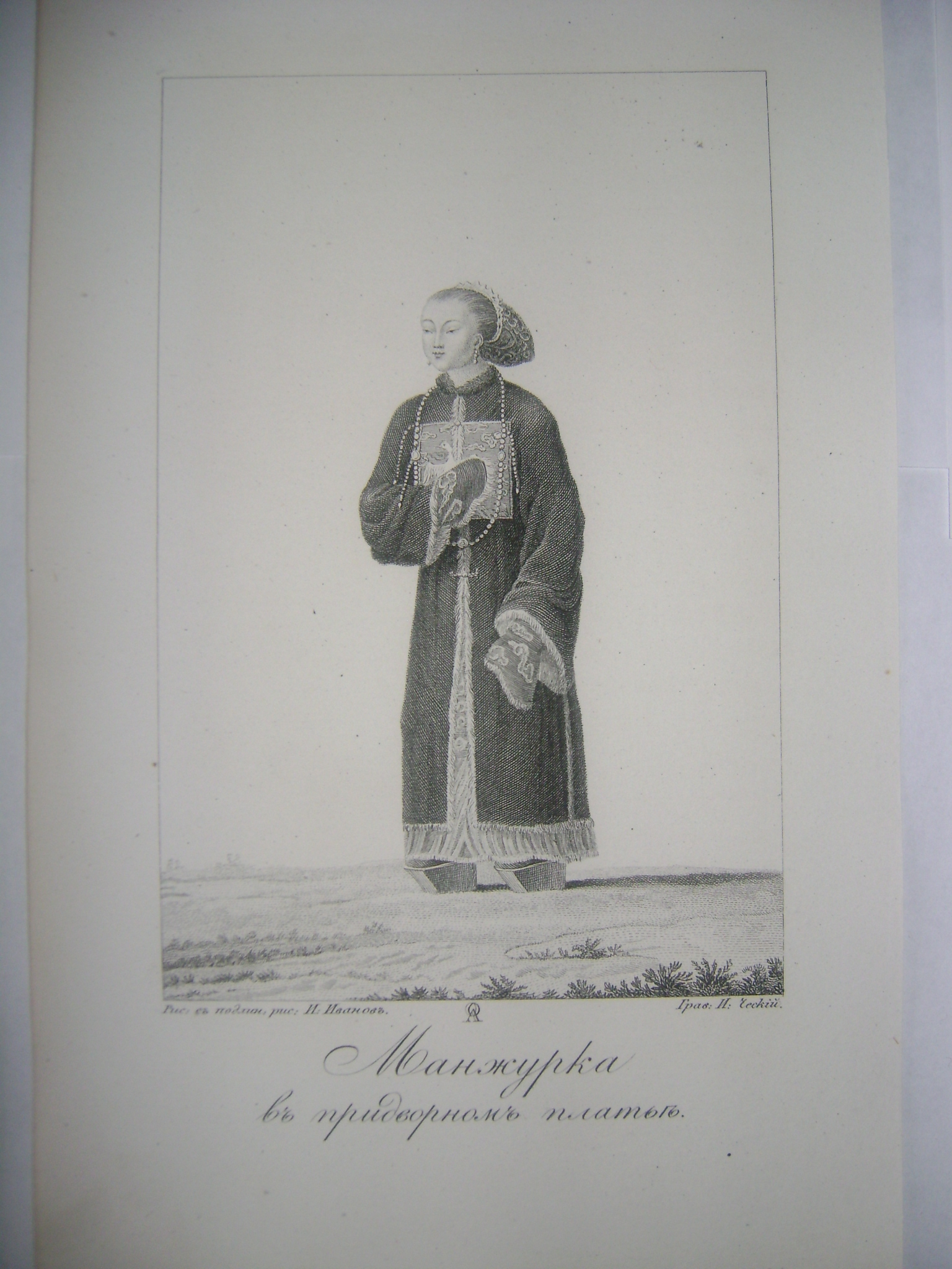 Ческий, Иван Васильевич (1777, (по другим сведениям 1782) — 17 июня (29 июня) 1848, Петербург) — русский художник-гравер. "Манжурка"